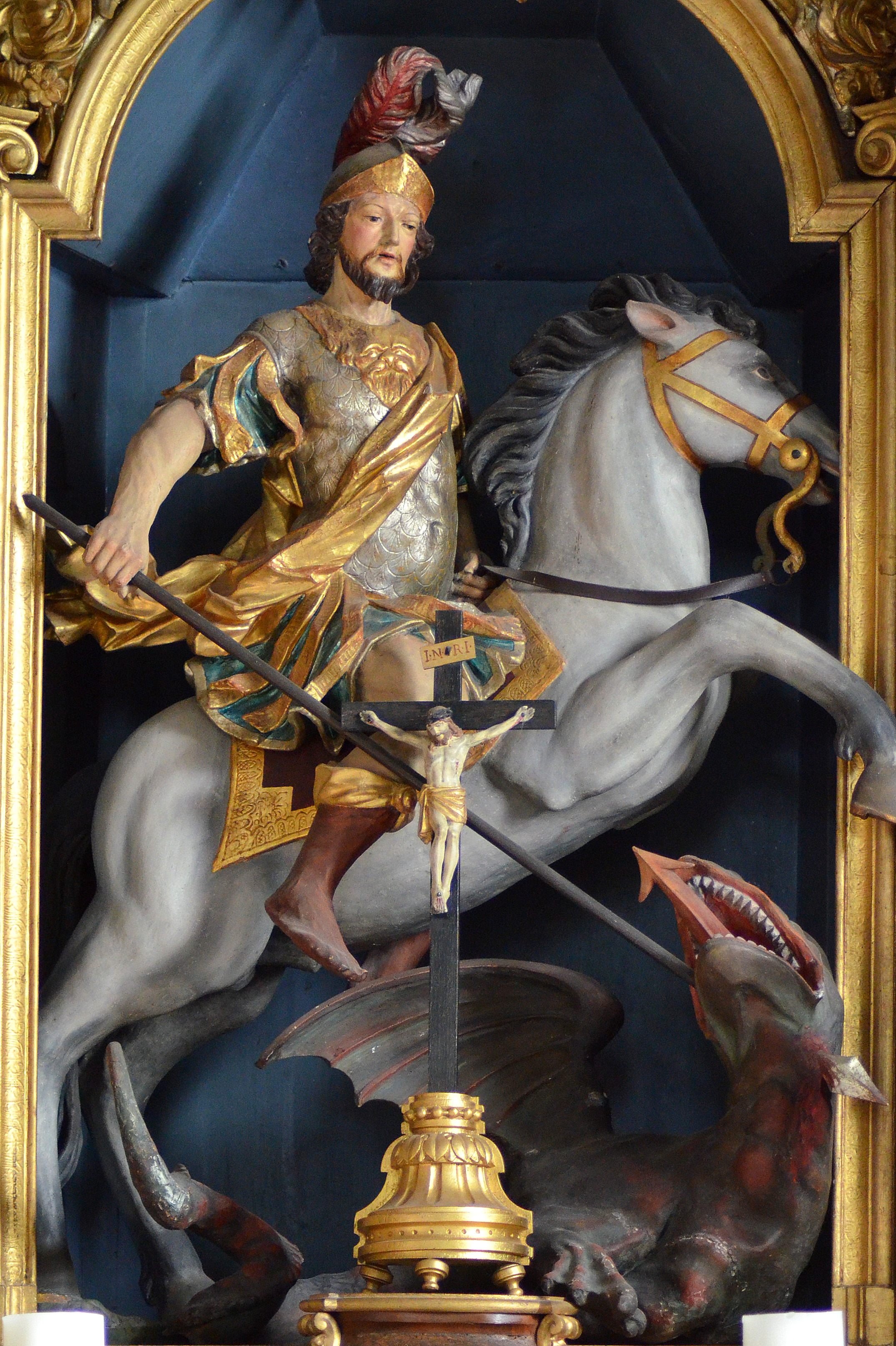 Beeld hoofdaltaar Sint-Joriskerk